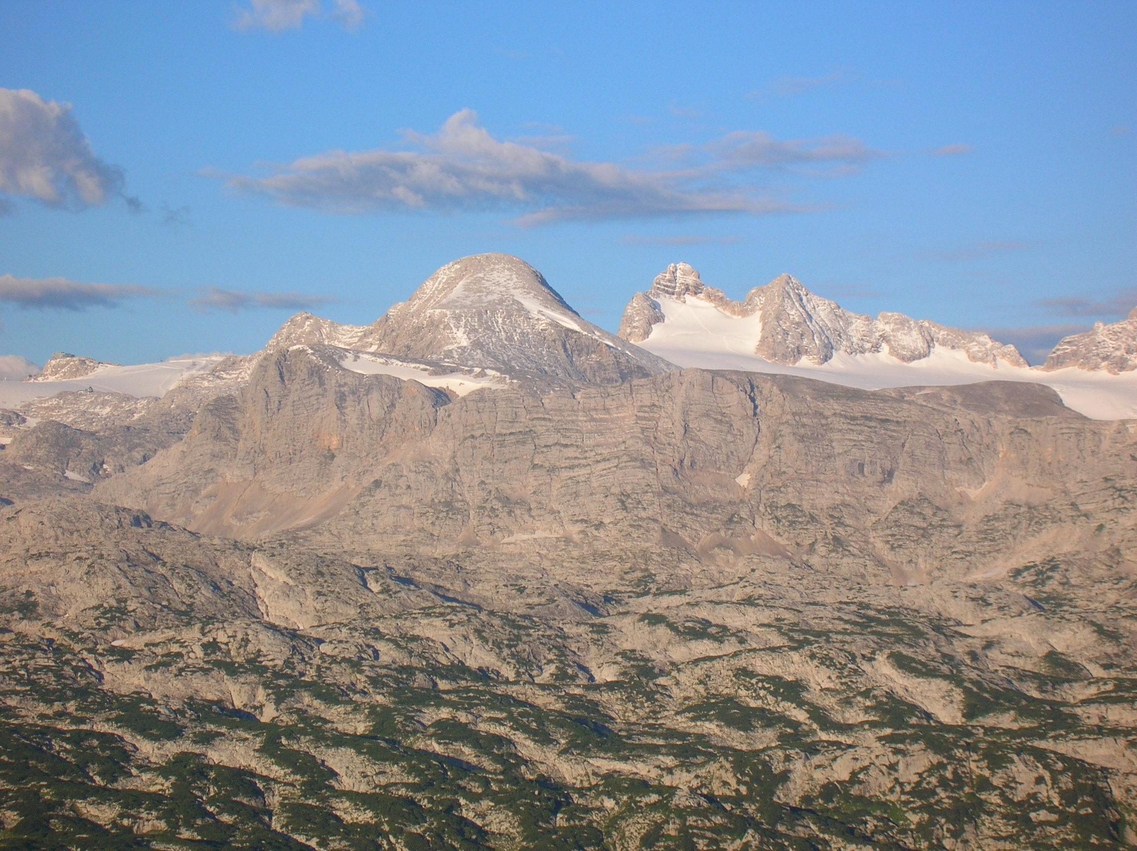 Dachstein, View from Margschierf to Hoher Gjaidstein and Hoher Dachstein